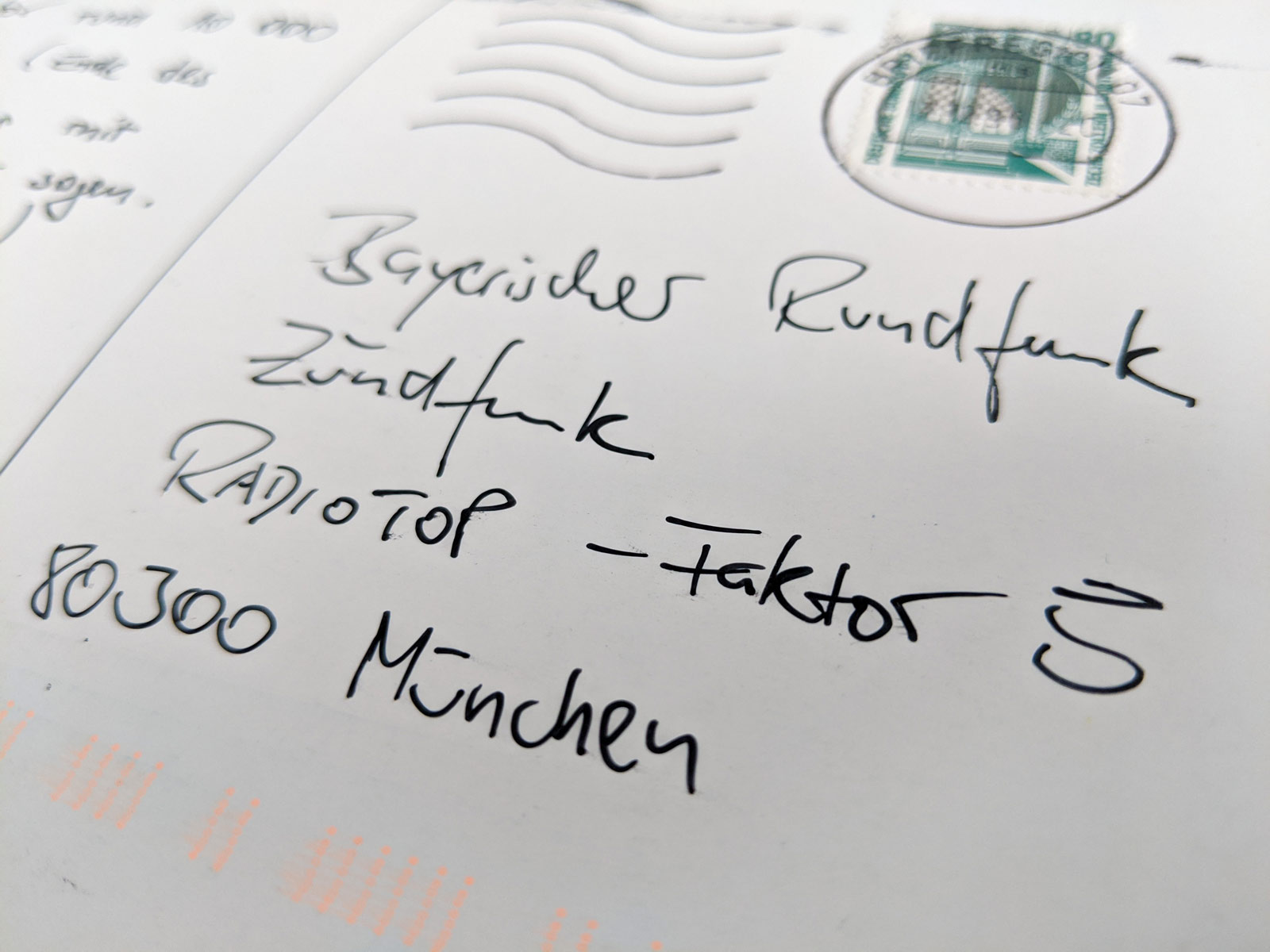 Der Zündfunk im Bayerischen Rundfunk hielt sich, im Unterschied zu Bayern 3, mit Gewinnspielen zurück. In den 1990er Jahren gab es allenfalls Schrott-Wichteln; das heißt, die HörerInnen, die richtige Lösungen einschickten und ausgelost wurden, konnten zum Beispiel Schallplattenpakete gewinnen, die in der Redaktion nicht gebraucht wurden. Ein solches Gewinnspiel zog sich durch viele Radiotop-Sendungen. Beim Faktor 5-Rätsel wurde in der Sendung ein Klassiker der Rockmusik präsentiert, und zwar um den Faktor 5 gekürzt, bei gleicher Tonhöhe. Im Radiotop vom Dezember 1996 war das "Eiszeit" von der New Wave-Band Ideal. Die Frage war aber nicht nach dem Song, sondern nach dem letzten, zu dem Songtitel passenden Ereignisses. Etwa 30 HörerInnen sandten die korrekte Lösung ein, um die 10.000 Jahre. Viele HörerInnen der Sendung stammten aus Gebieten der ehemaligen DDR. Auch dieser: Bad Klosterlausnitz in Thüringen.